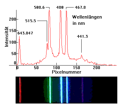 Niederdruck-Spektrum von Cadmium